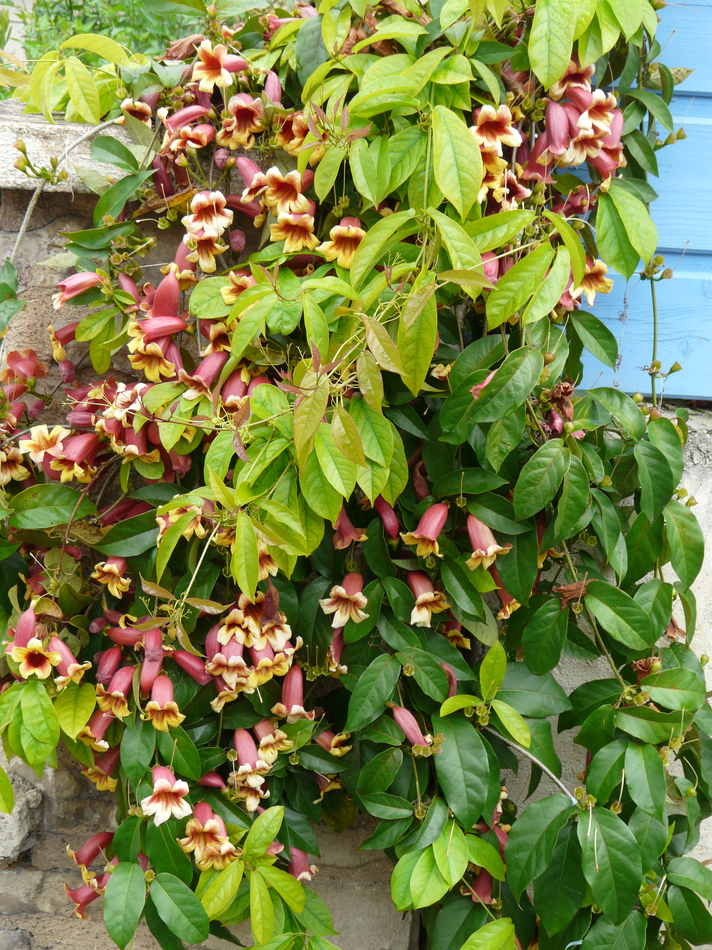 Bignonia capreolata à Périgueux, Dordogne, France.